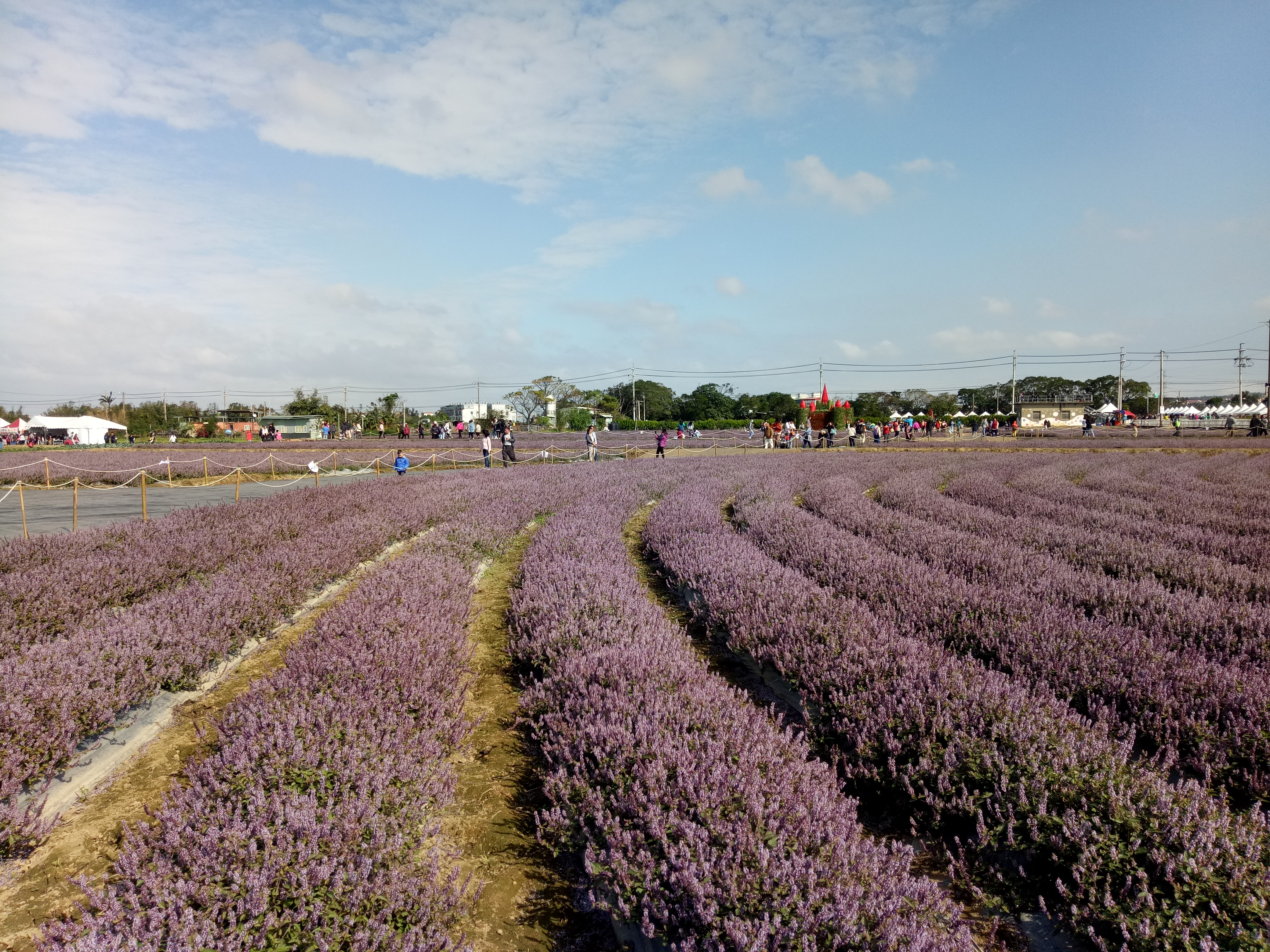 楊梅區上湖里花海。2019年11月26日。